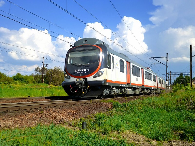 Elektryczny zespół trakcyjny ED72A-004 w okolicach stacji Kraków Płaszów.